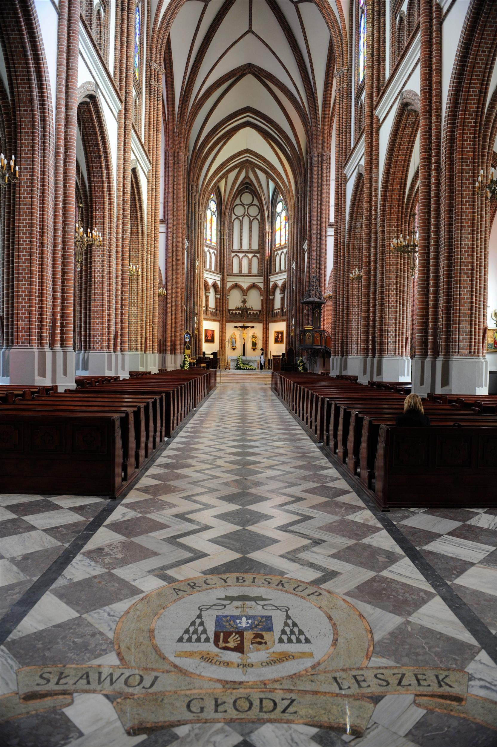 Wnętrze Bazyliki katedralnej św. Michała i św. Floriana w Warszawie